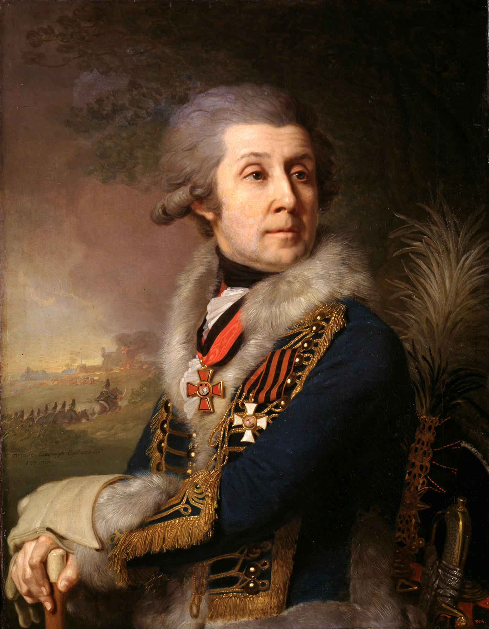 Фёдор Арте́мьевич Боро́вский (1746—1805) — русский военный деятель, генерал-майор.